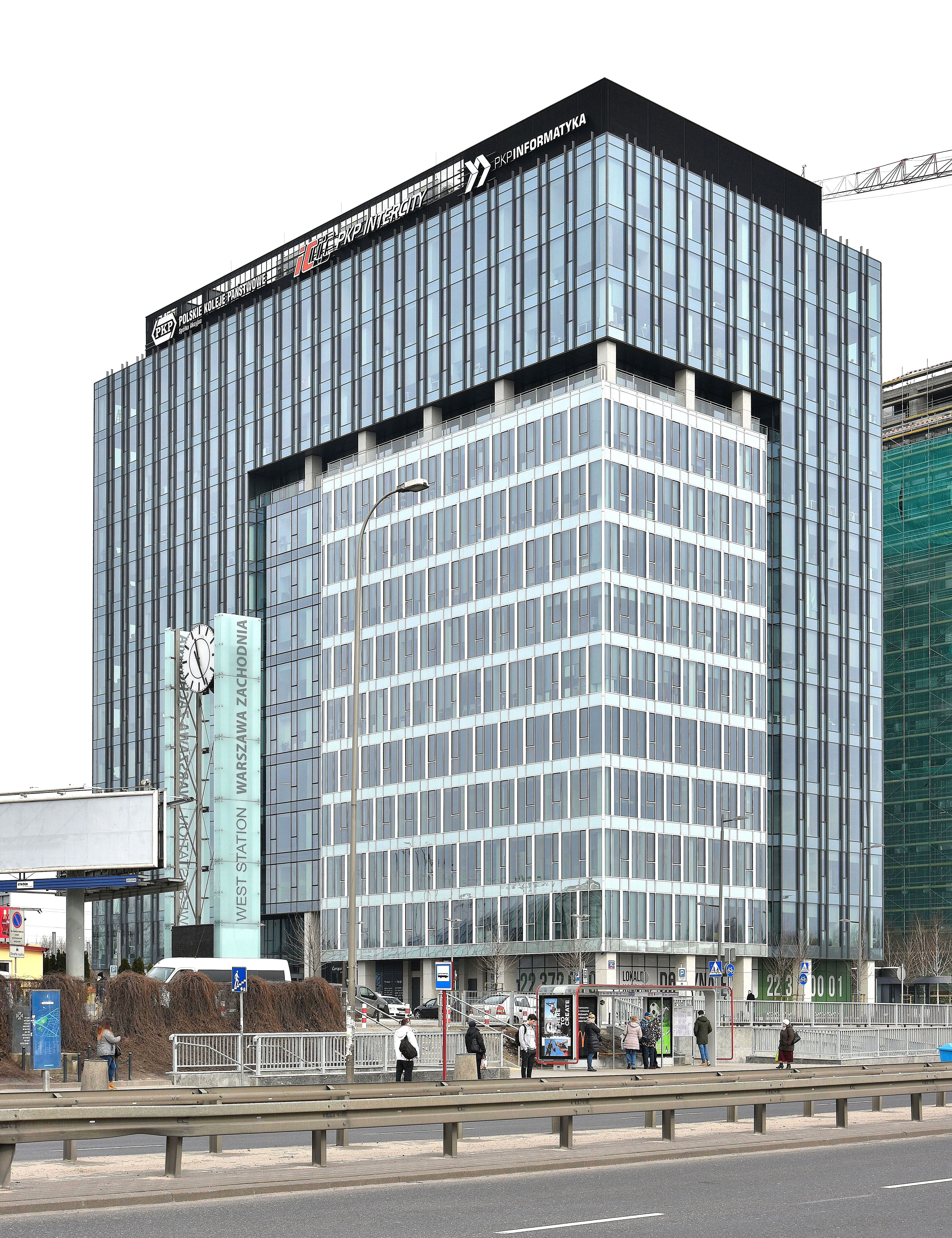 Biurowiec West Station w Al. Jerozolimskich 142A w Warszawie